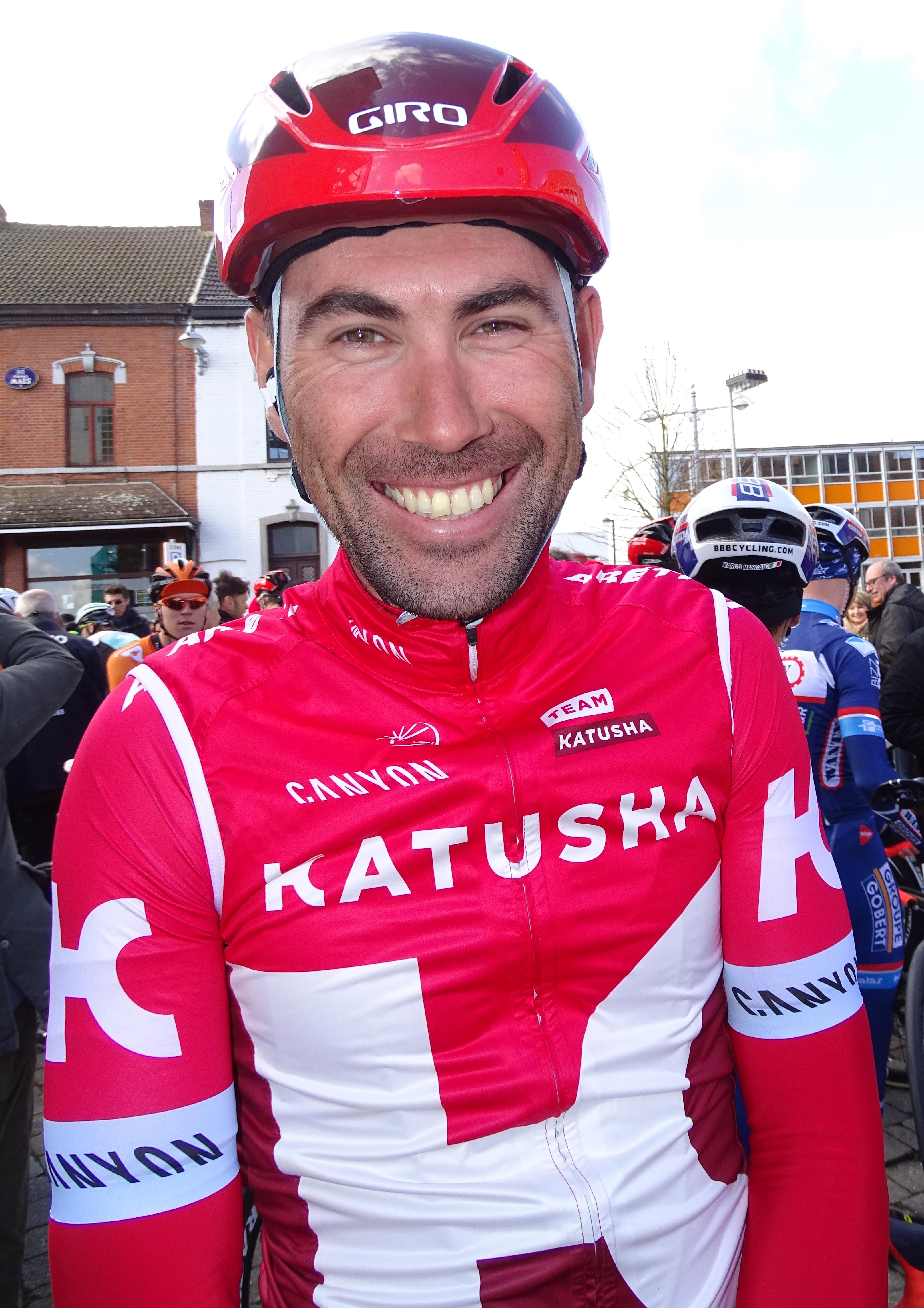 Reportage réalisé le mercredi 2 mars à l'occasion du départ du Samyn des Dames 2016 et du Samyn 2016 à Quaregnon, Belgique.